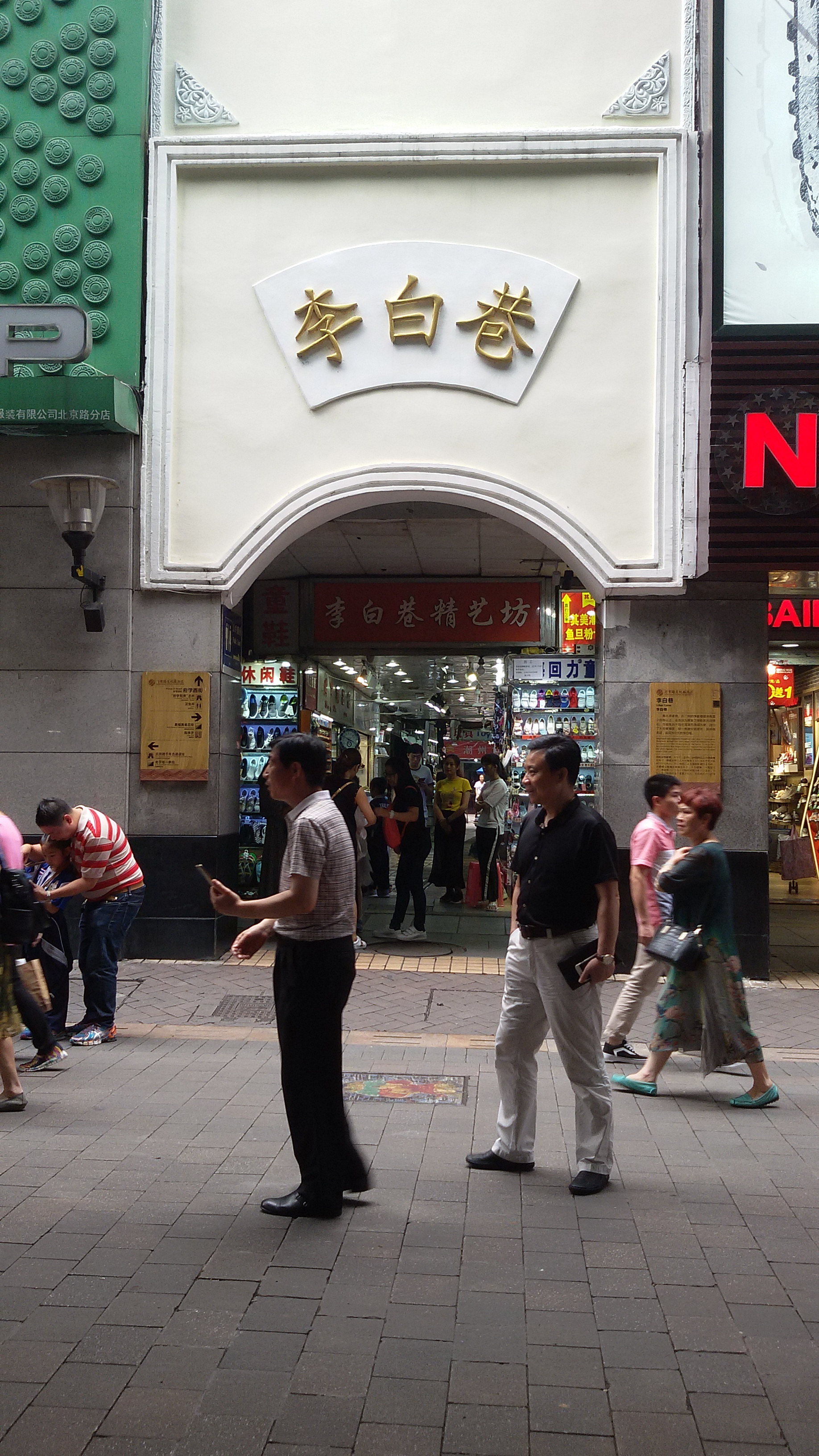 粵語: 李白巷（原名李家巷）